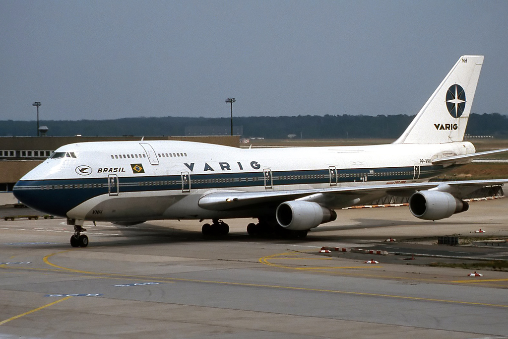 PP-VNH N747-300 Varig